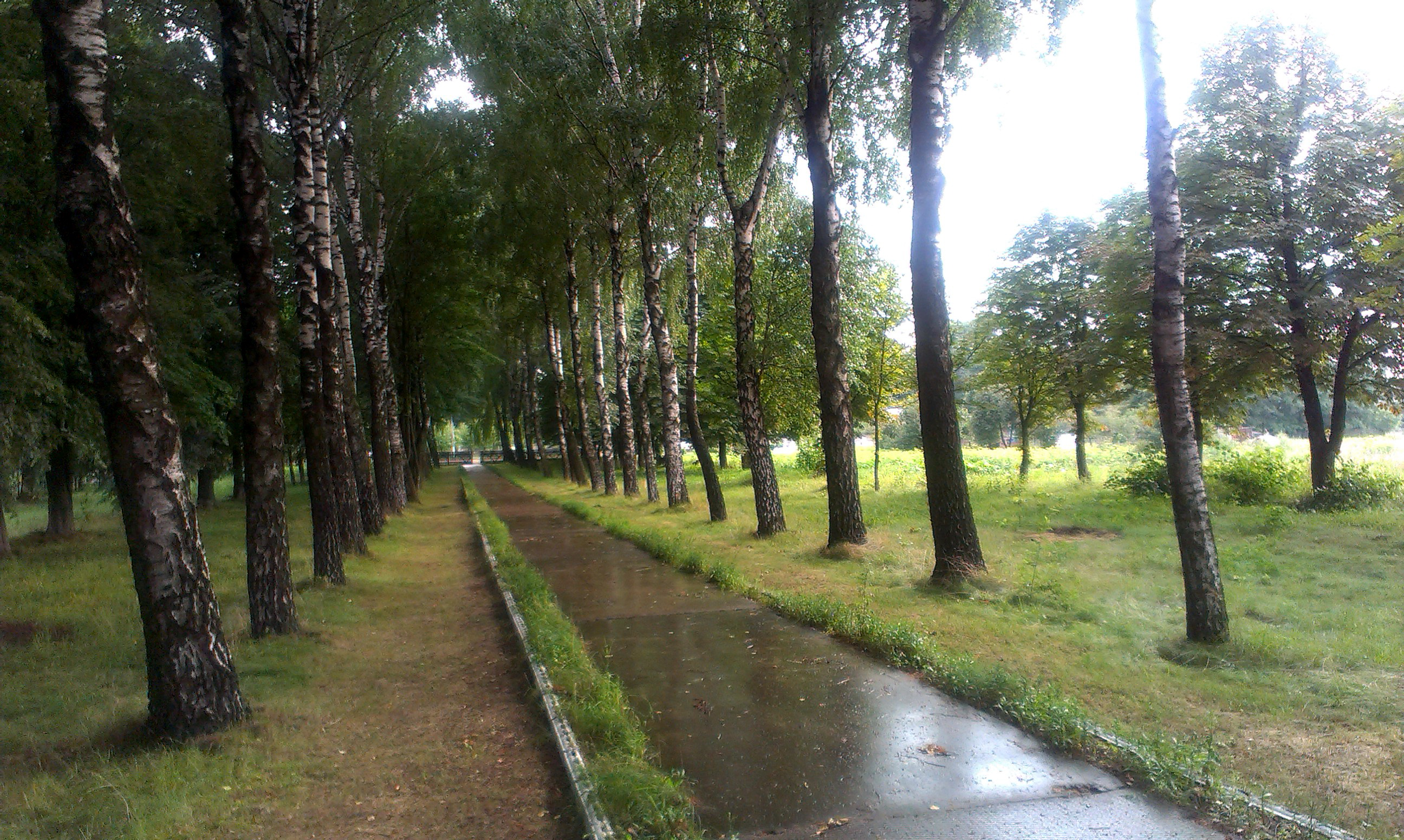 Алея